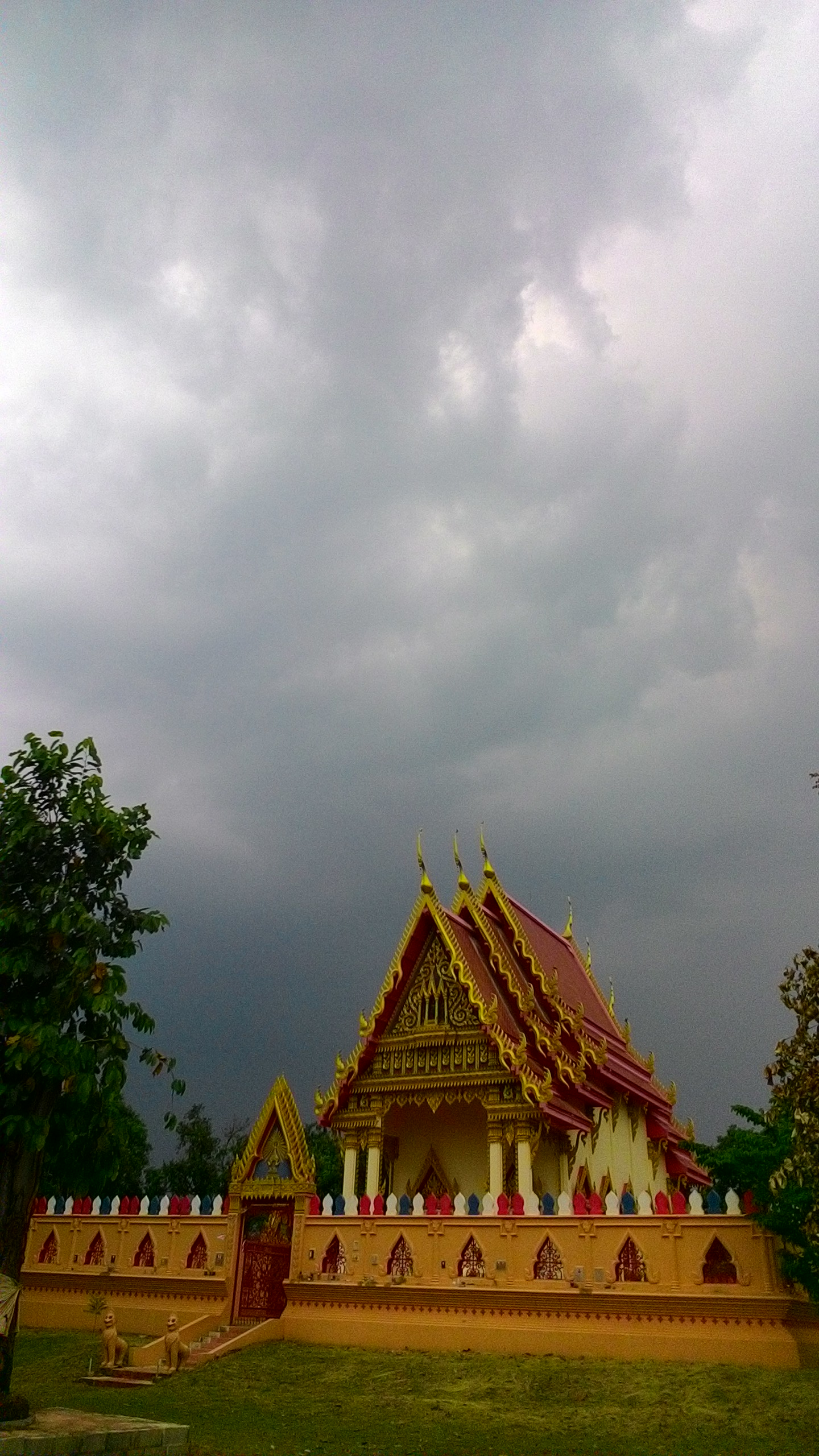 อุโบสถ วัดไตรสิริมงคล{ซับตะคร้อ }